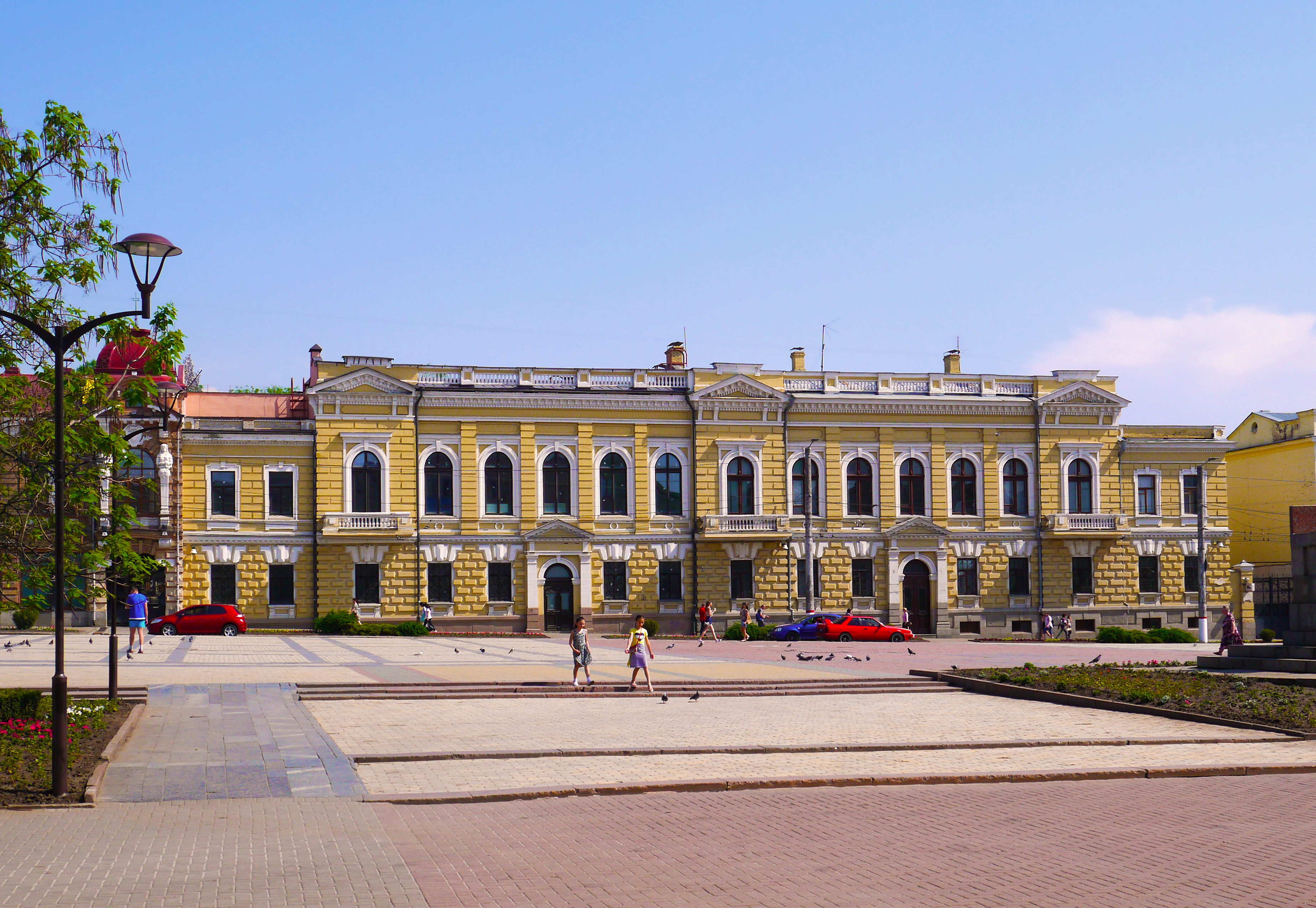 Колишнє повітове відділення державного банку, Кропивницький, вул. Велика Перспективна (К. Маркса), 33